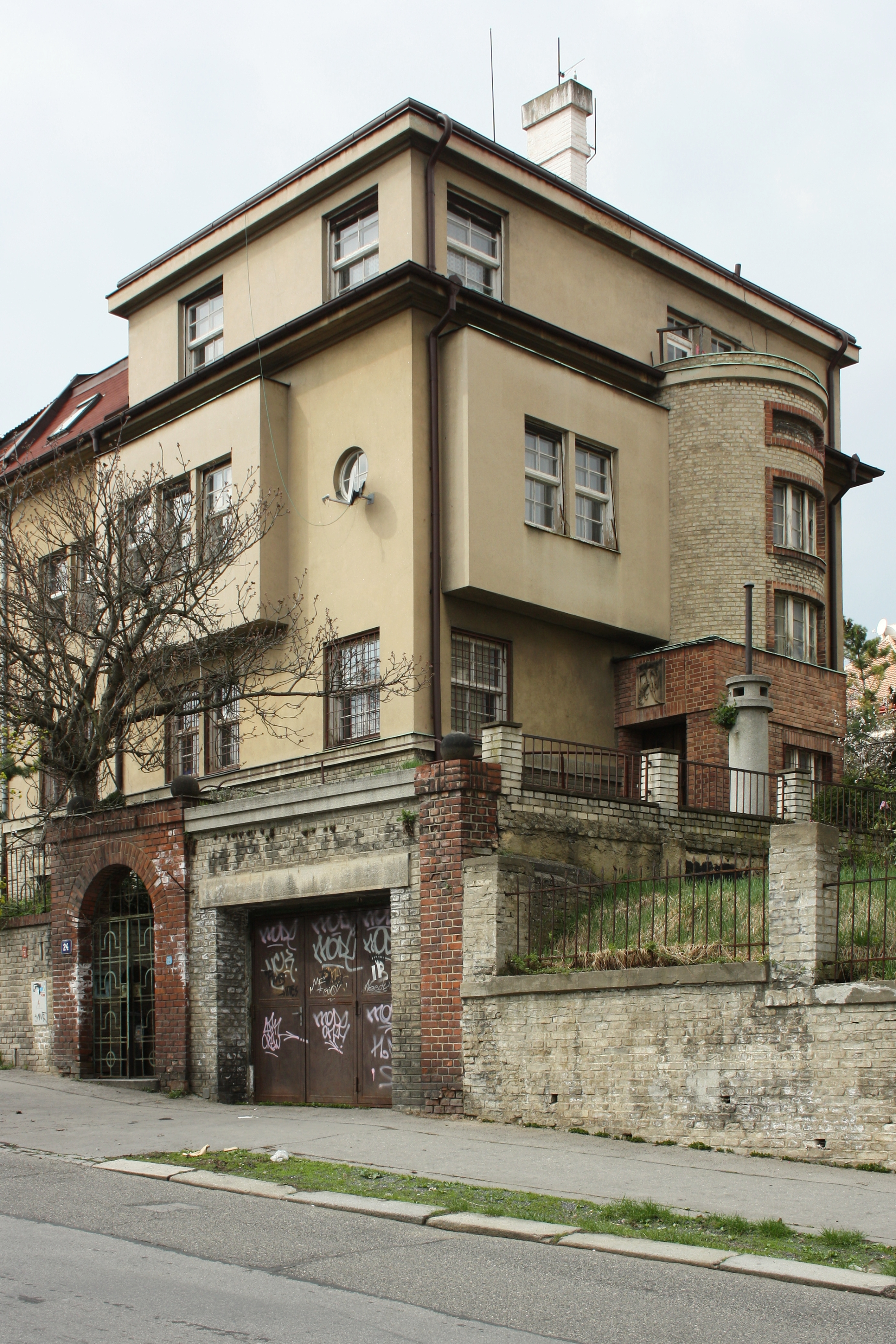 Vila U Mrázovky 24 (č.p. 1827) postavená dle plánů architekta Viléma Kvasničky v letech 1927 až 1929